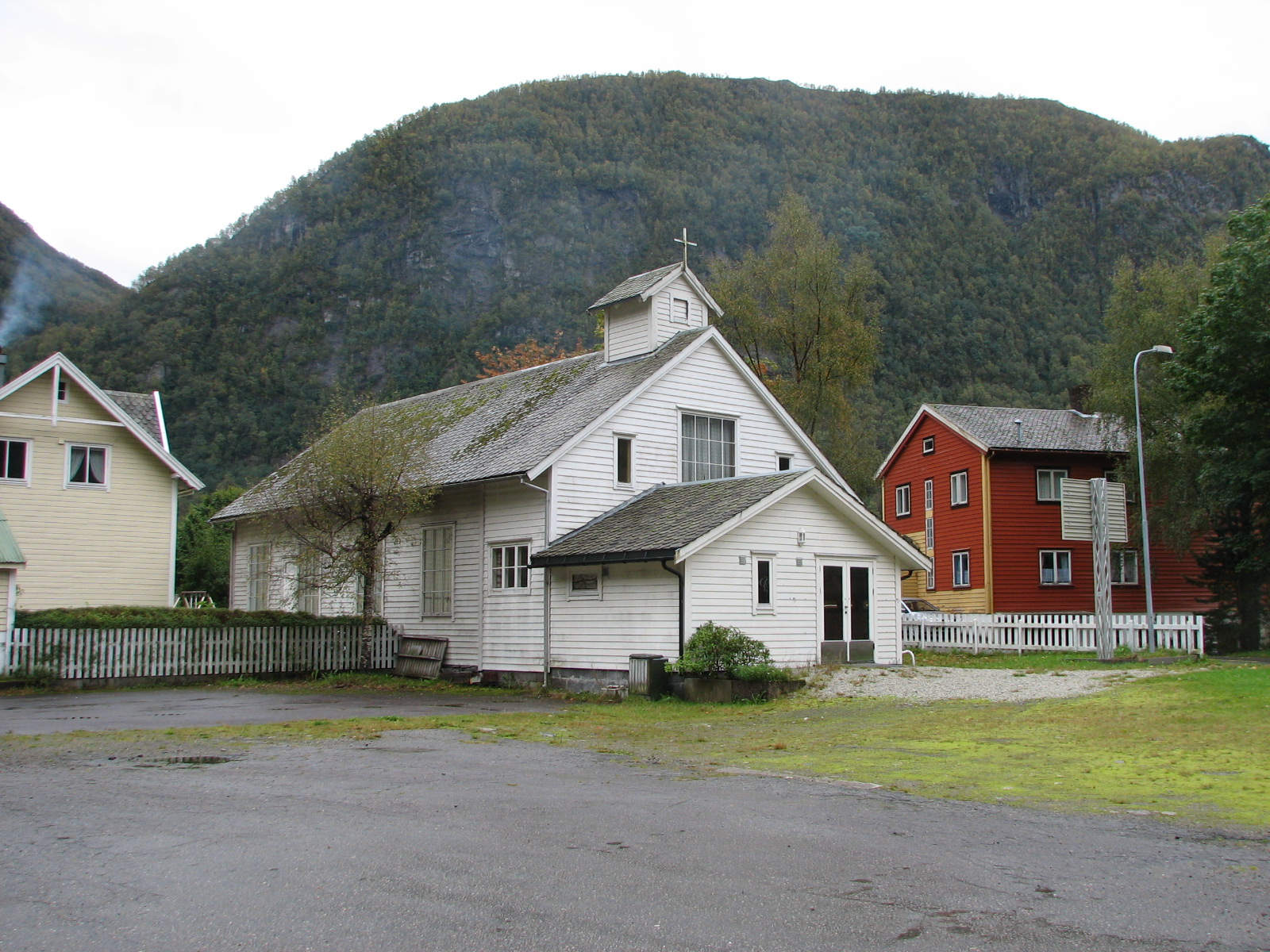 Vadheim bedehuskapell i Høyanger kommune vart bygd som bedehus i 1914 av arkitekt og byggmeistar Andreas P. Vattekar